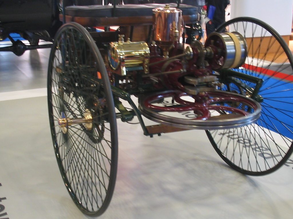 Benz 3-wheels, 2004